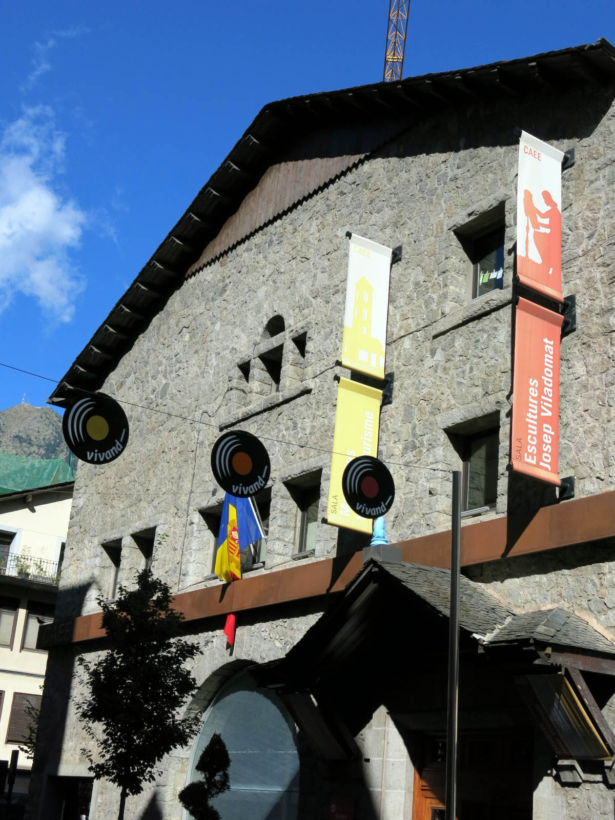 Garatge i cinema Valira (Escaldes)